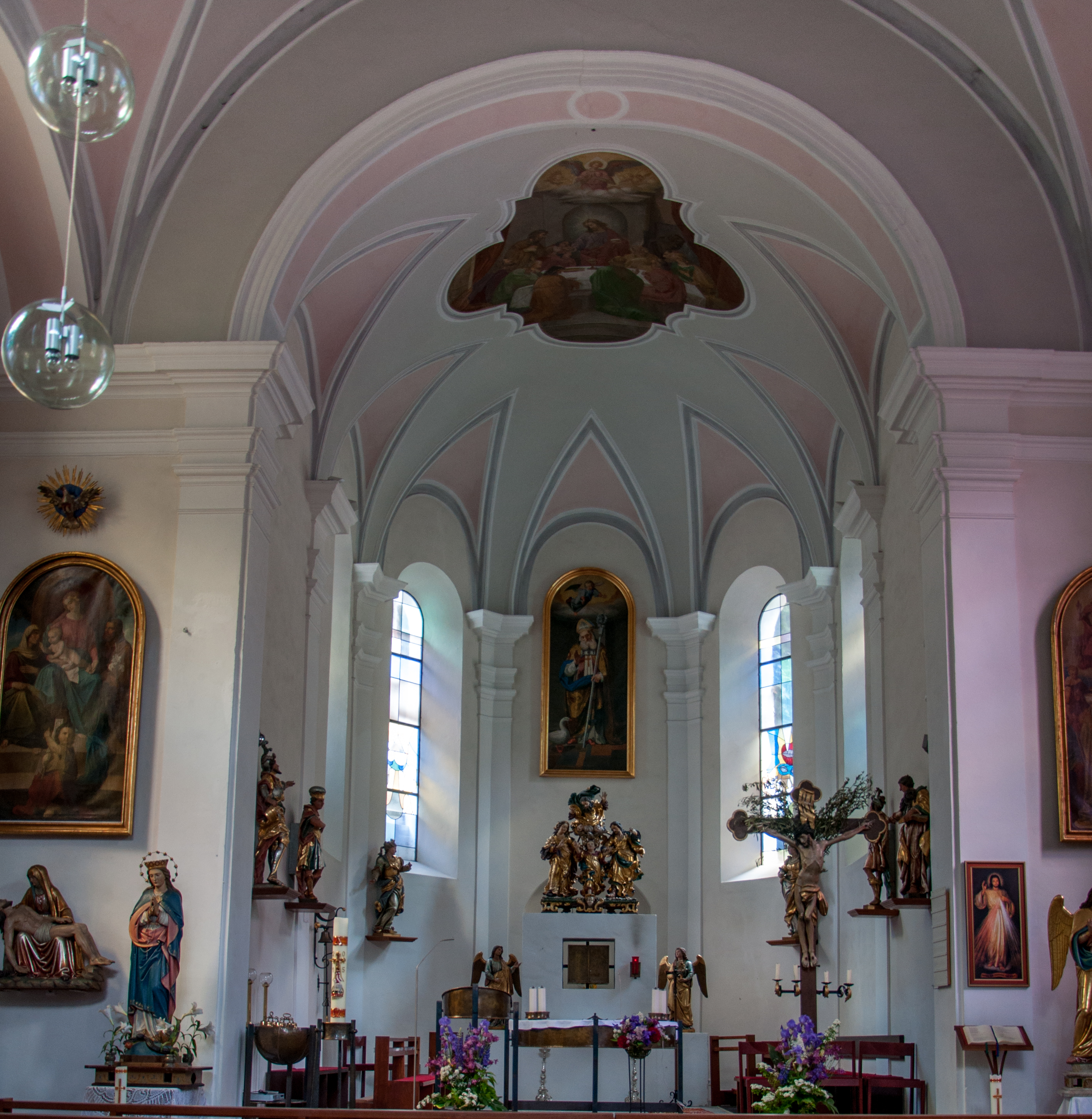 Kath. Pfarrkirche hl. Martin